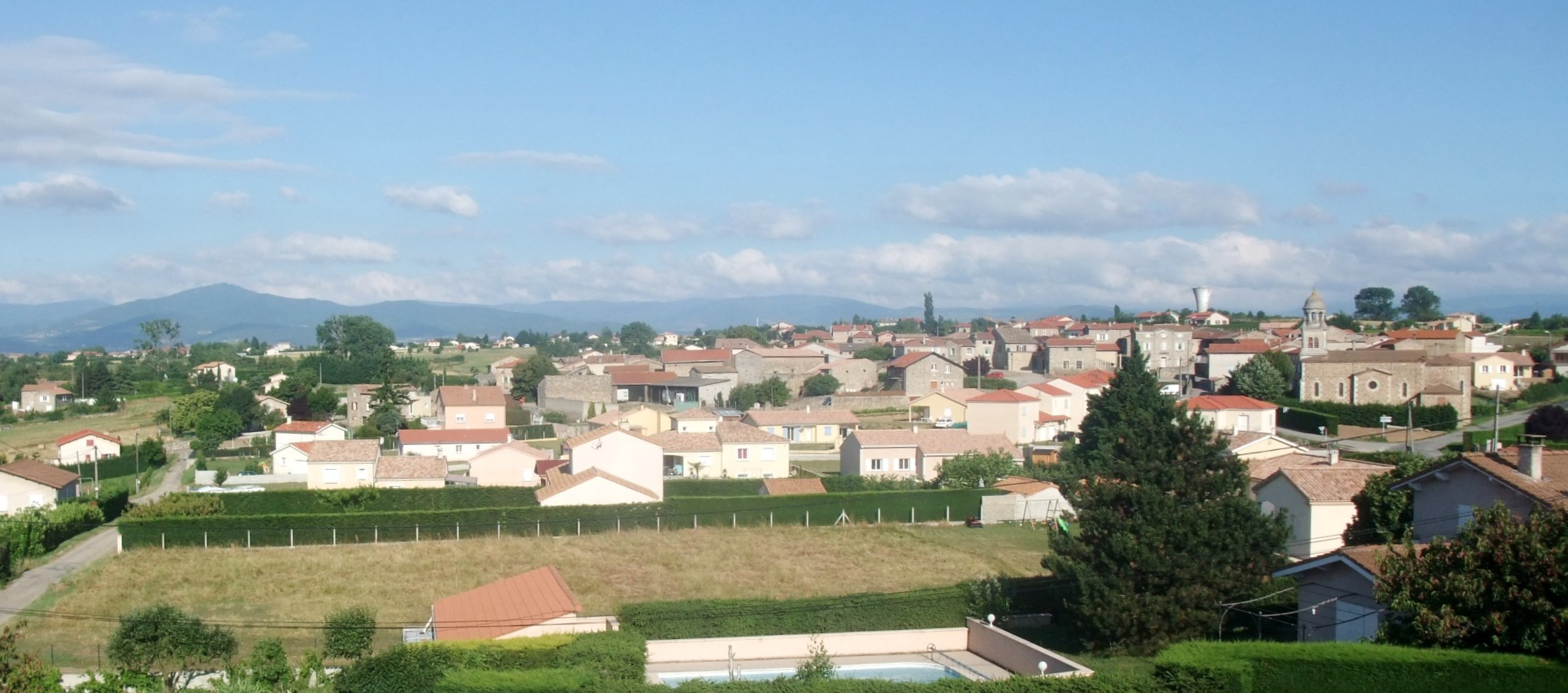 Talencieux village